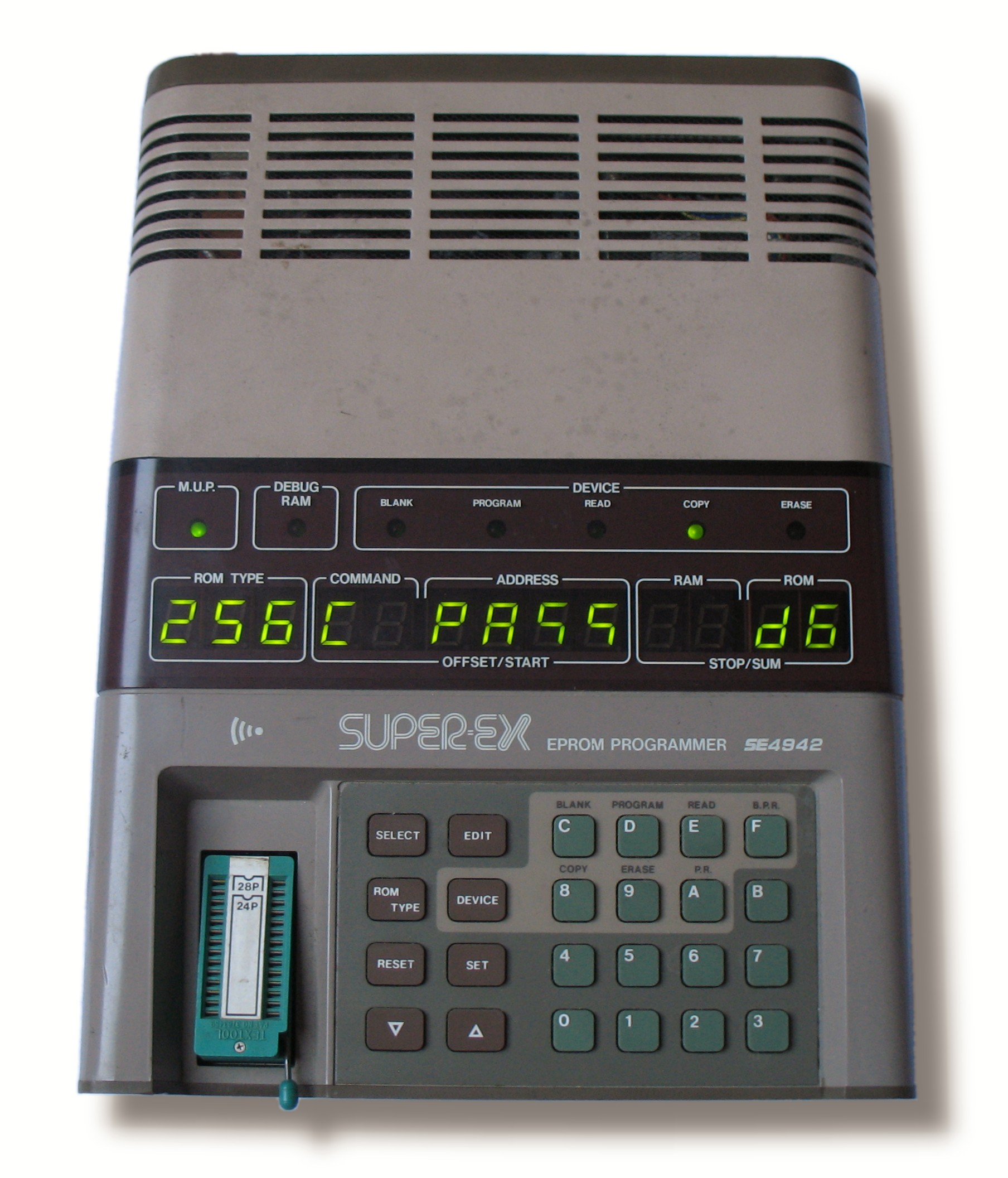 Programmiergerät (älteres Modell, Baujahr unbekannt)